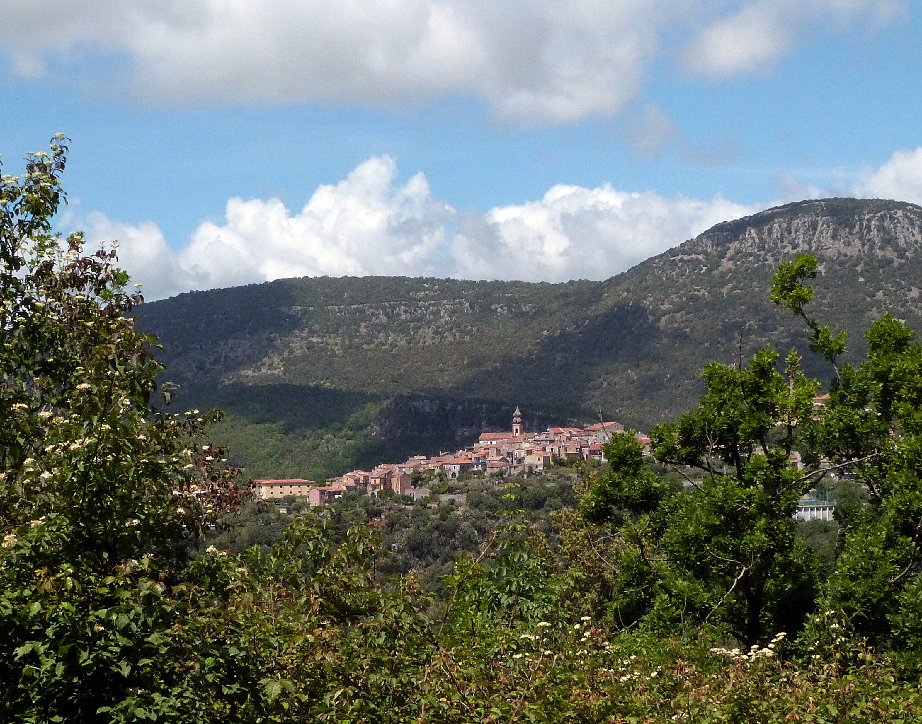 Morigerati